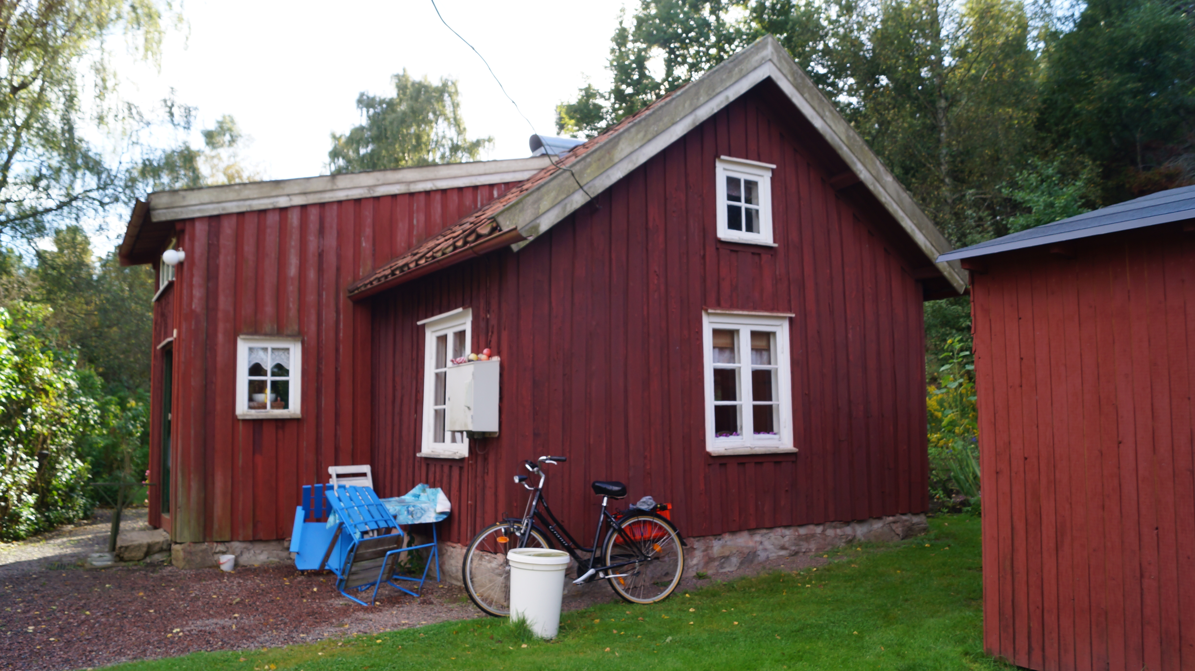 Torpet Klara ( Biskopsgården830:902) Torp Dagsverkstorp 5 Byggnader